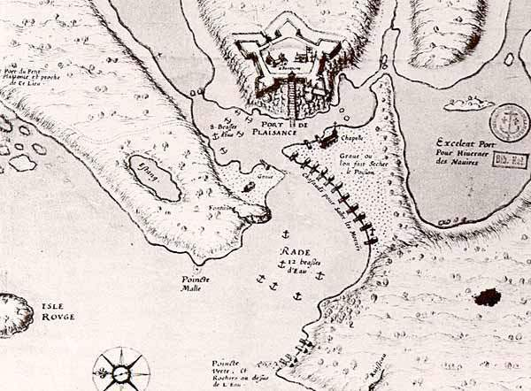 Carte des fortifications françaises de Plaisance, à Terre-Neuve, sans doute du XVIIIème siècle.